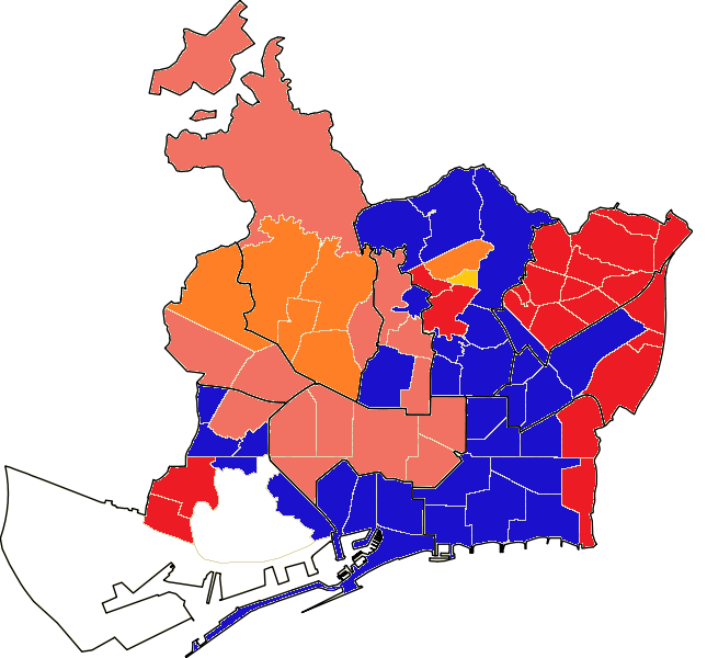 Segunda fuerza más votada por barrios de Barcelona en las elecciones municipales de 2015. Leyenda: -Rosado: Barcelona en Común -Azul: CiU -Rojo: PSC -Naranja: Ciudadanos -Amarillo: ERC